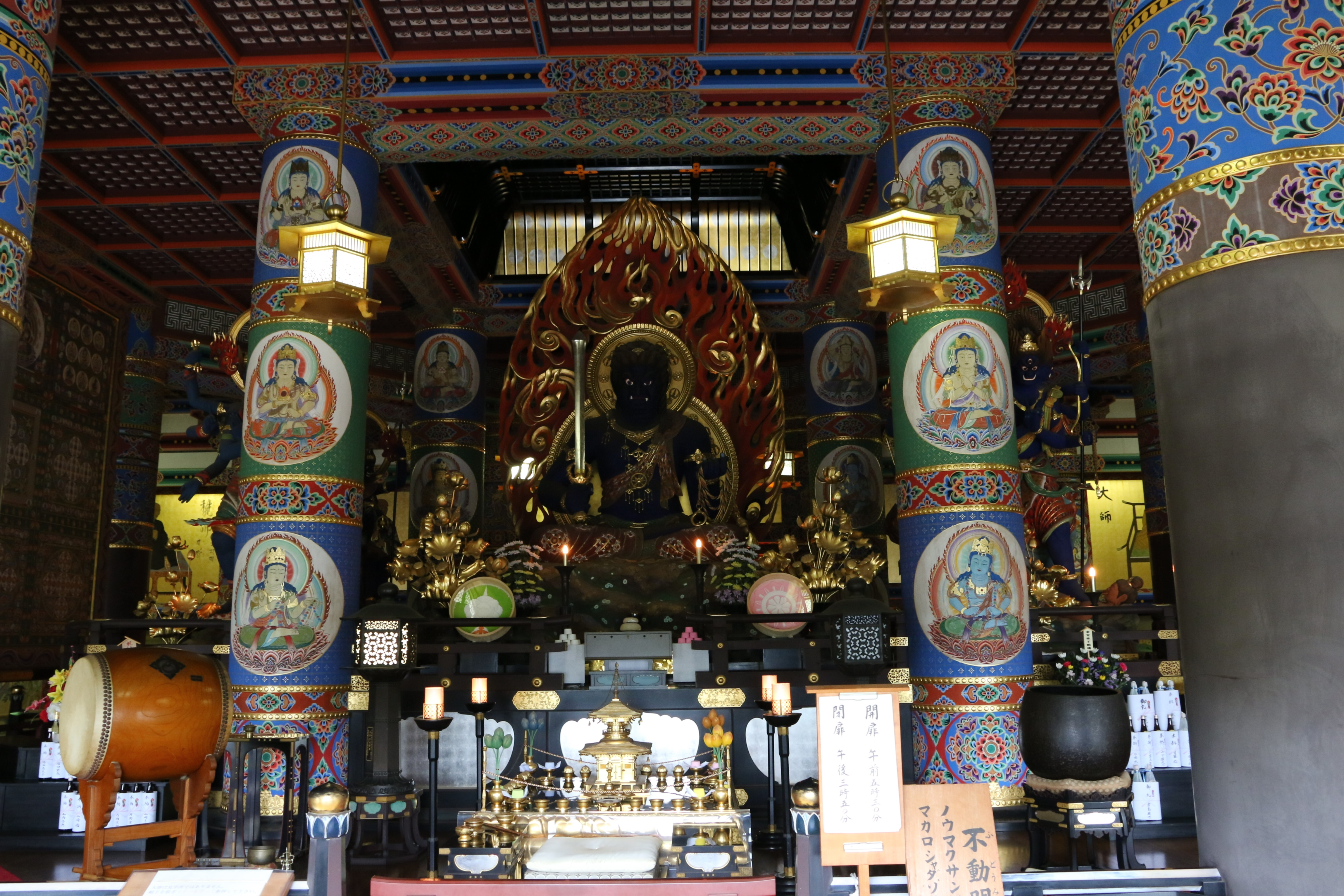 Naritasan Temple angry god in Great Pagoda of Peace